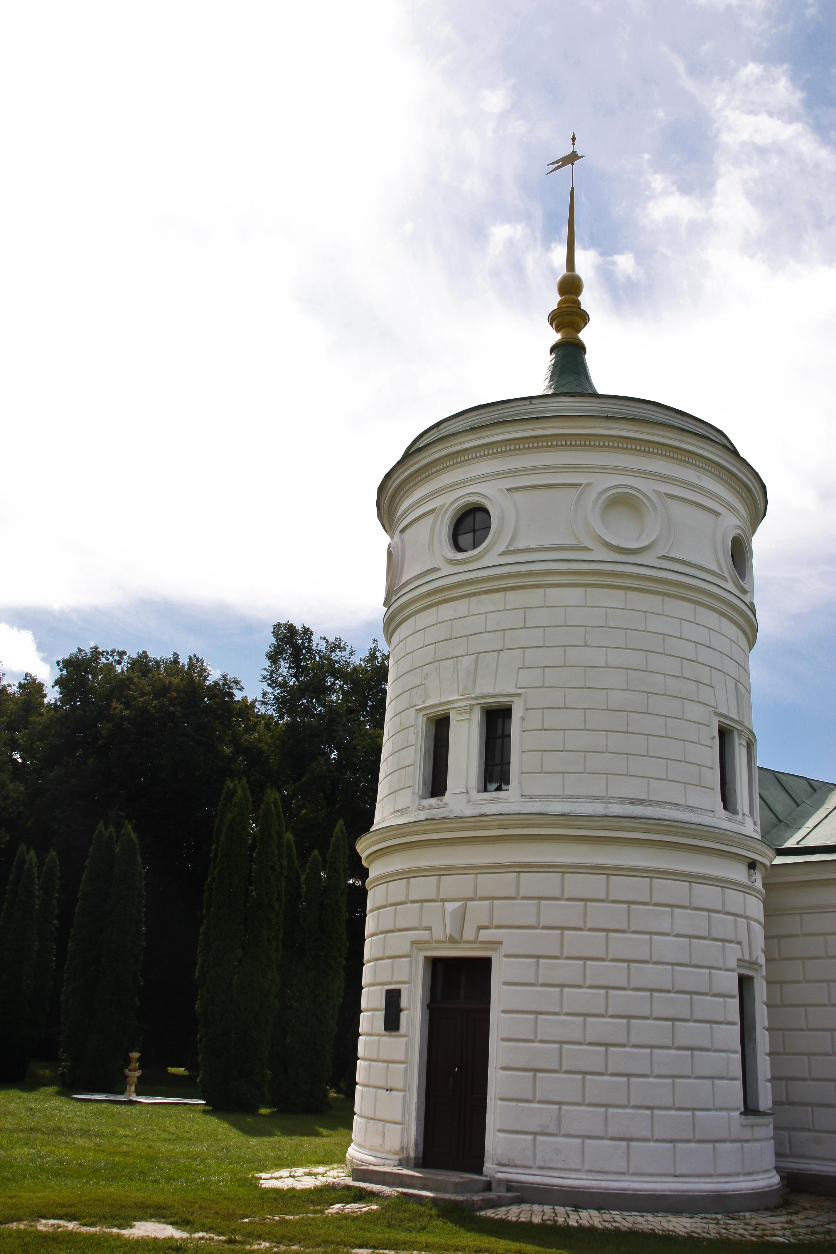 Комплекс споруд садиби "Качанiвка", Качанівка